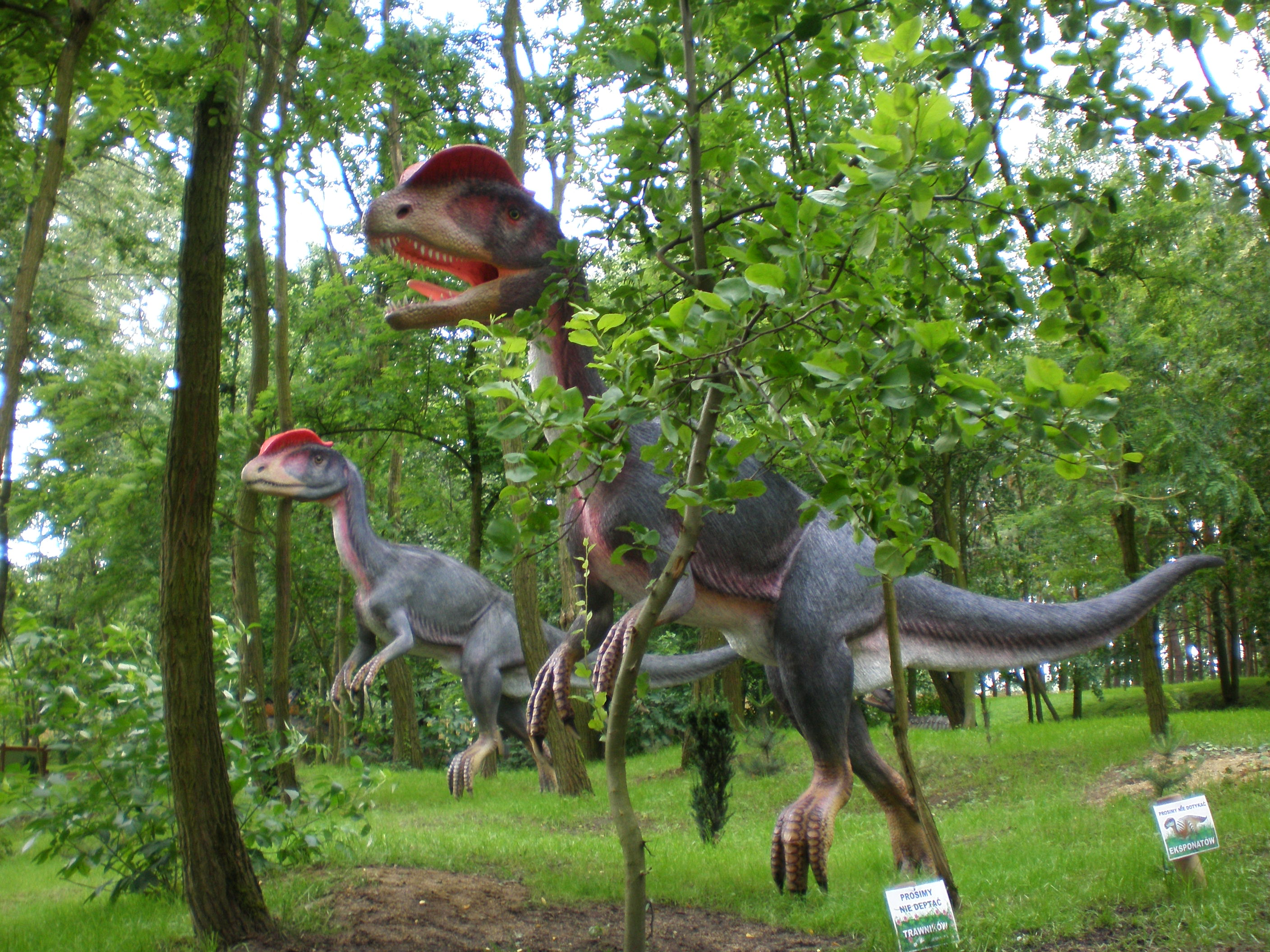 Rogowo, atak Dilophosaurus